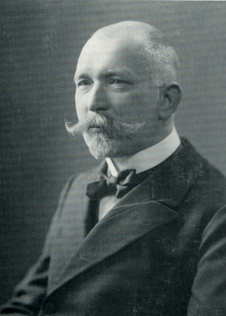 Porträtfotografie von Pastor Martin Bücking (1868–1954)